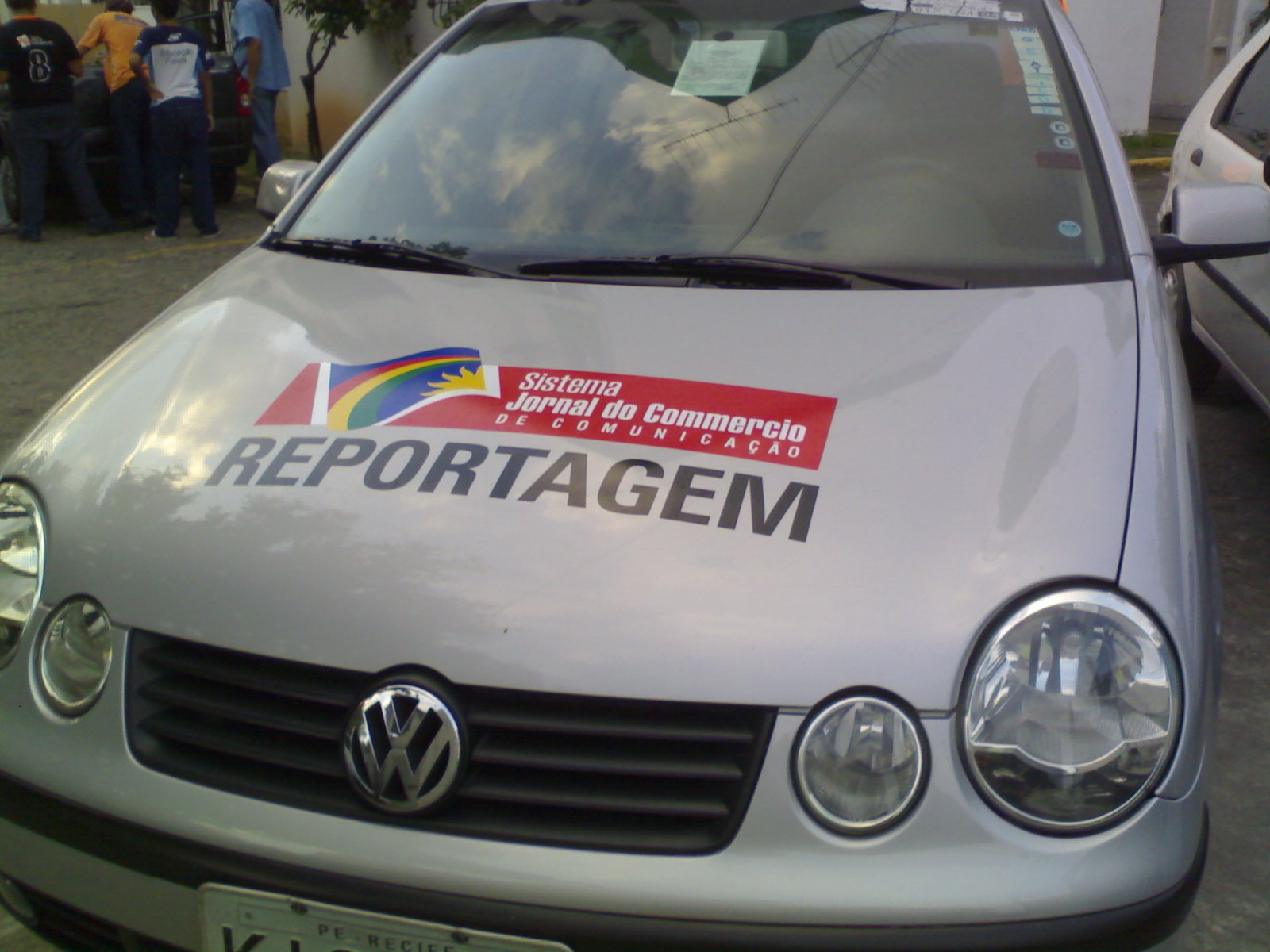 Carro de reportagem da Sistema Jornal do Commercio de Comunicação.